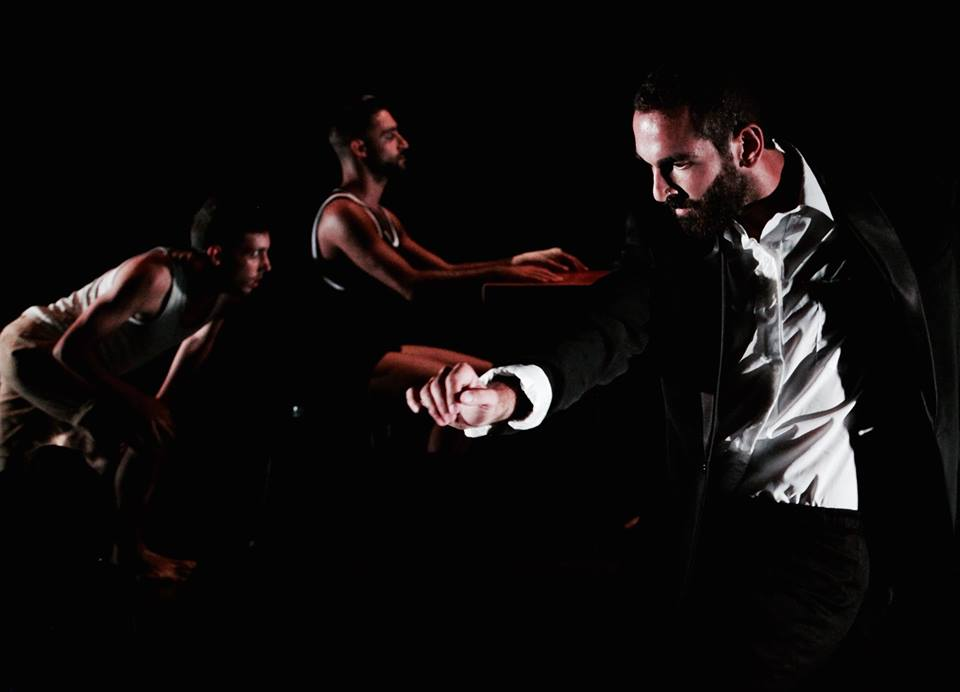 תמונת מחול